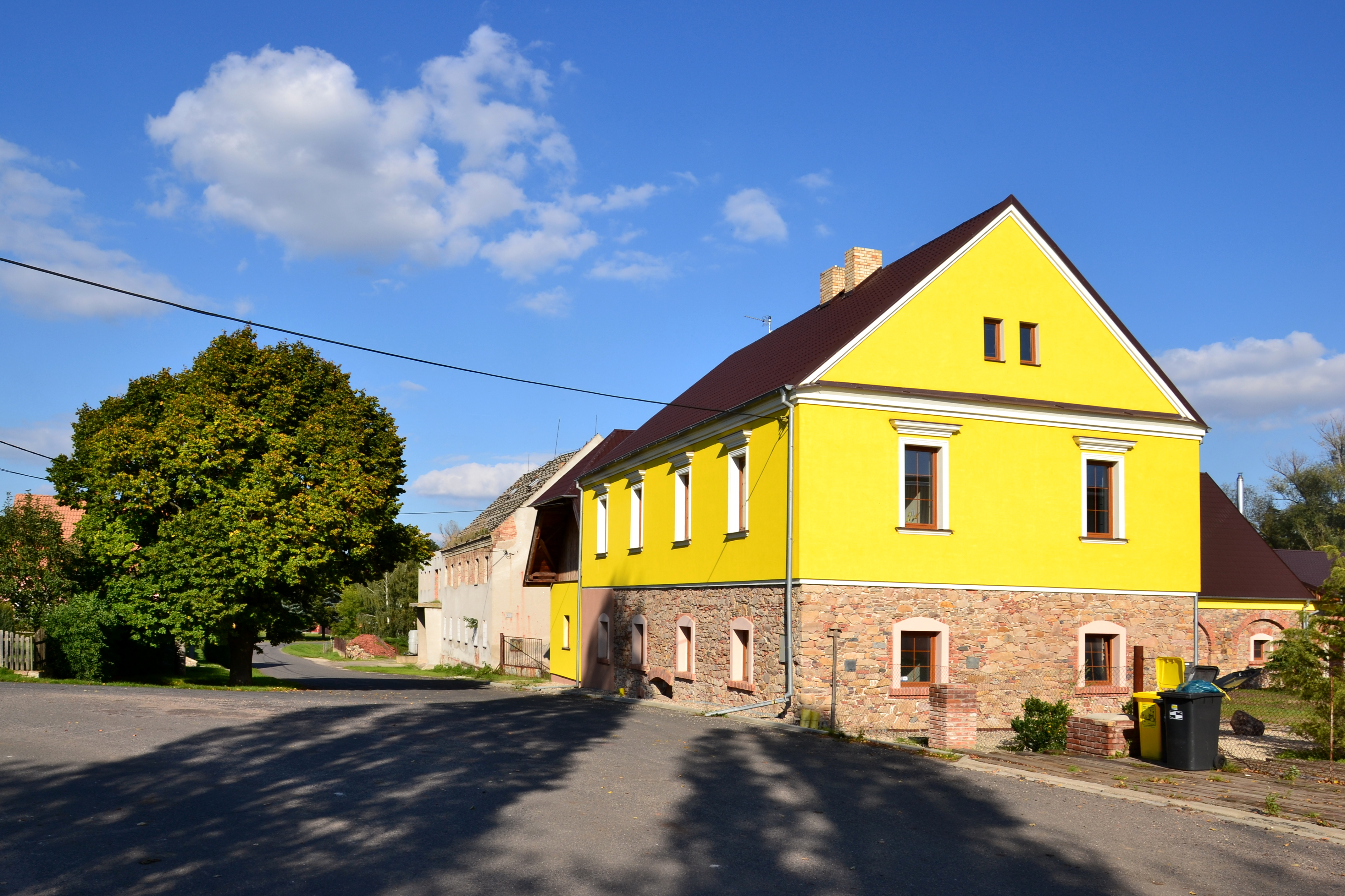 Střezov - dům u křižovatky pod bytovými domy